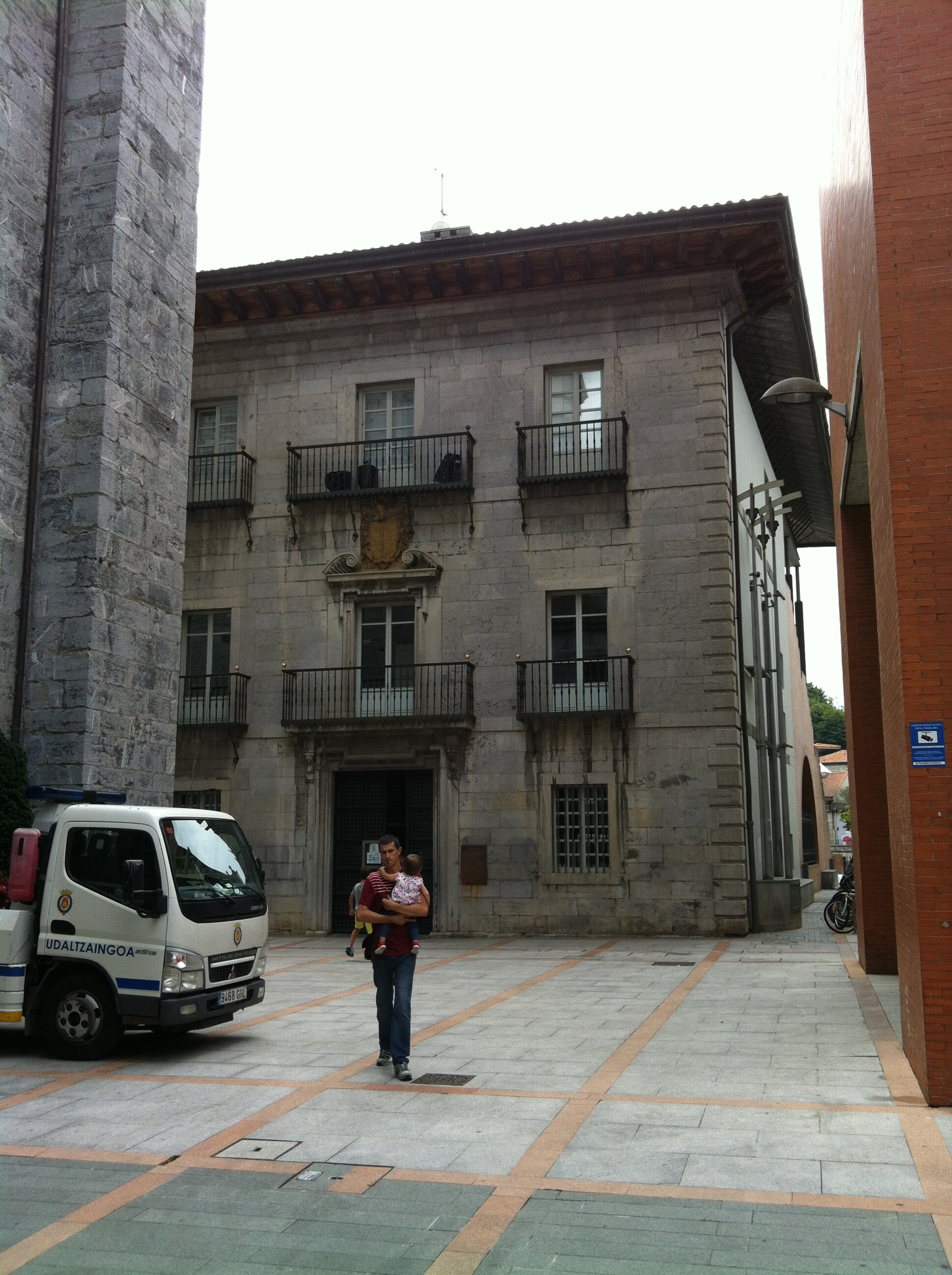 Biblioteca de TolosaEuskara: Tolosako liburutegia